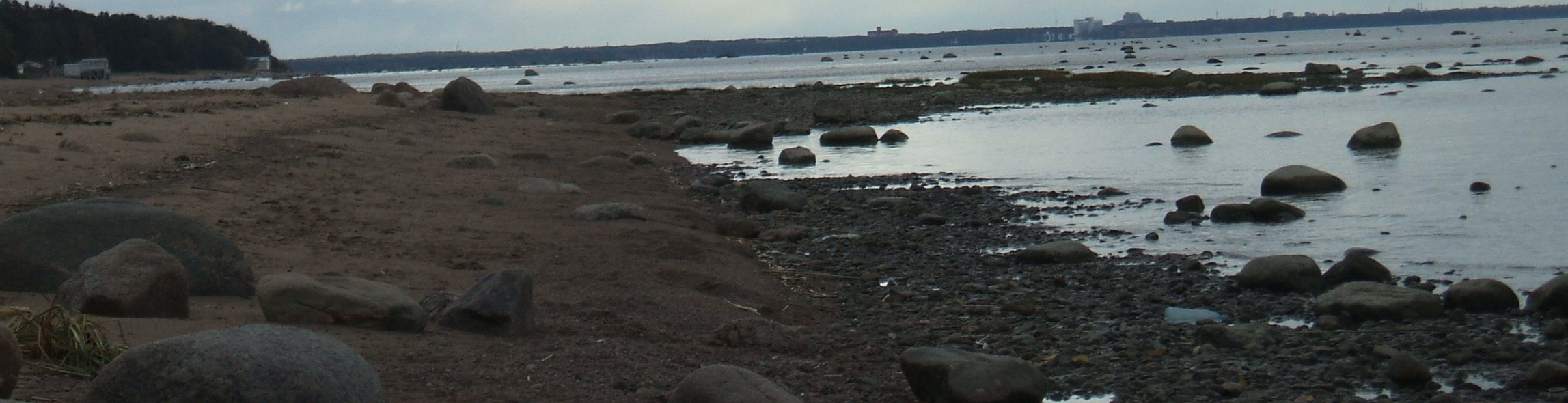 Комарово СПб Заказник Комаровский берег